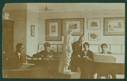 Снимка на професор Йосиф Питер със свои студенти в Рисувалното училище в София.